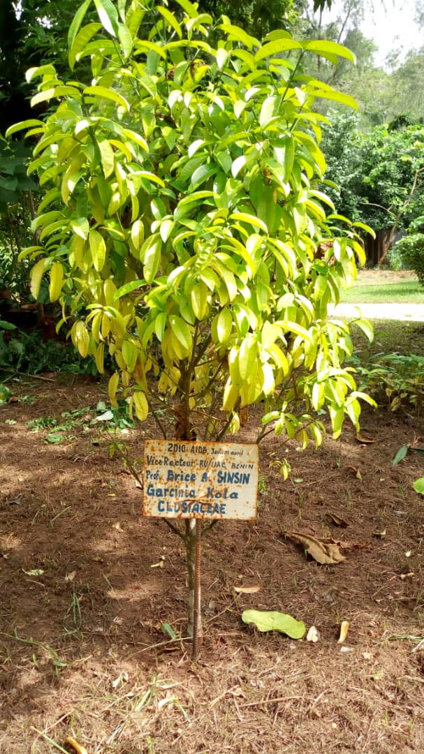 La flore du Jardin Botanique et Zoologique de l'Université d'Abomey-Calavi au Bénin